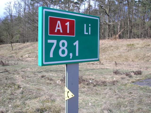 Hectometerbord c.q. Hectometerpaal langs de A1 op km 78,1 linker rijbaan met richtingbordje naar praatpaal. Fotowerk volledig vrijgegeven voor gebruik in het publieke domein door fotograaf (pudding). De ontwerper van het bordje heeft mogelijk auteursrecht op het ontwerp hiervan, maar zolang het bordje wordt weergegeven zoals het langs de openbare weg gefotografeerd is zou de foto onbeperkt hergebruikt mogen worden. Uitlichten van het bordje alleen uit de achtergrond is mogelijk strafbaar.